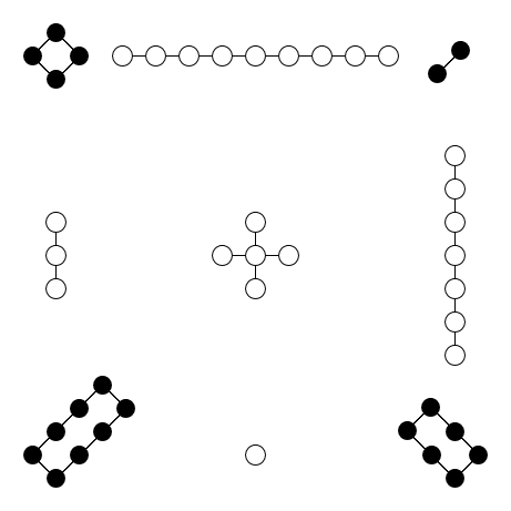 九數圖 jiushutu